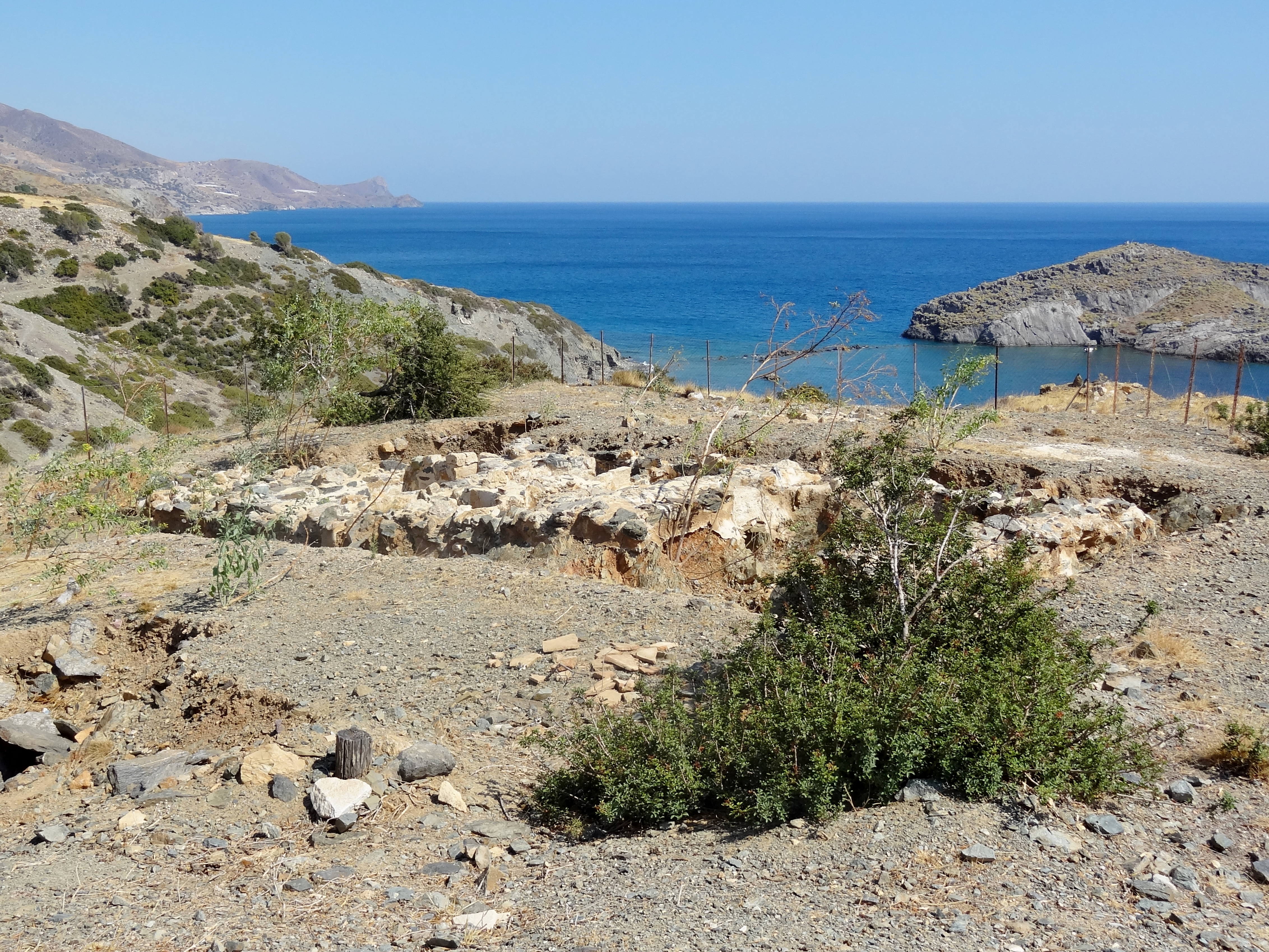 Antike Stätte von Lasaia (Λασαία), Gemeinde Festos, Regionalbezirk Iraklio, Kreta, Griechenland